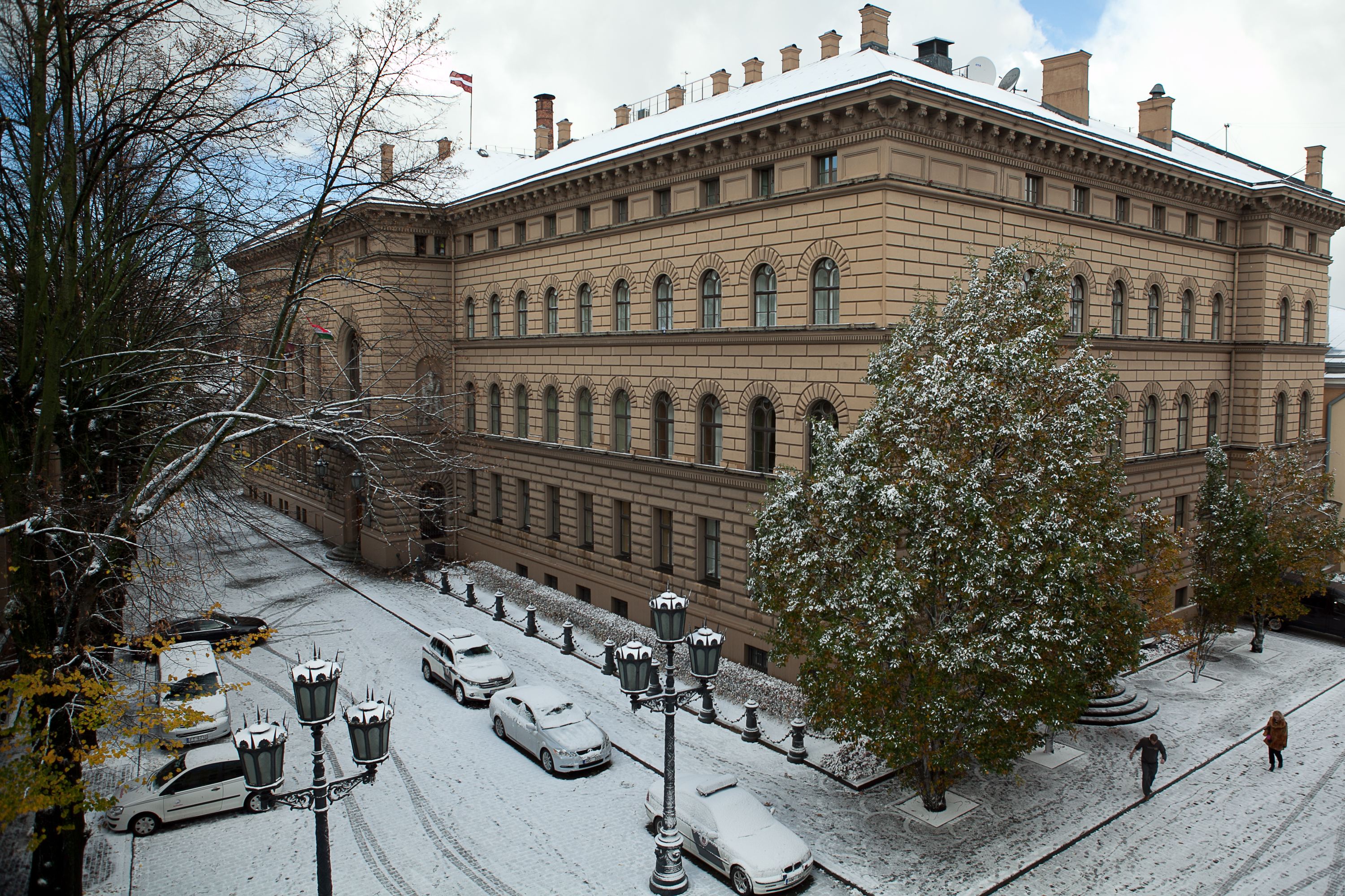 2012.gada 26.oktobris. Pirmais sniegs pārvērtis arī Saeimas apkārtni. Foto: Ernests Dinka, Saeimas Kanceleja.